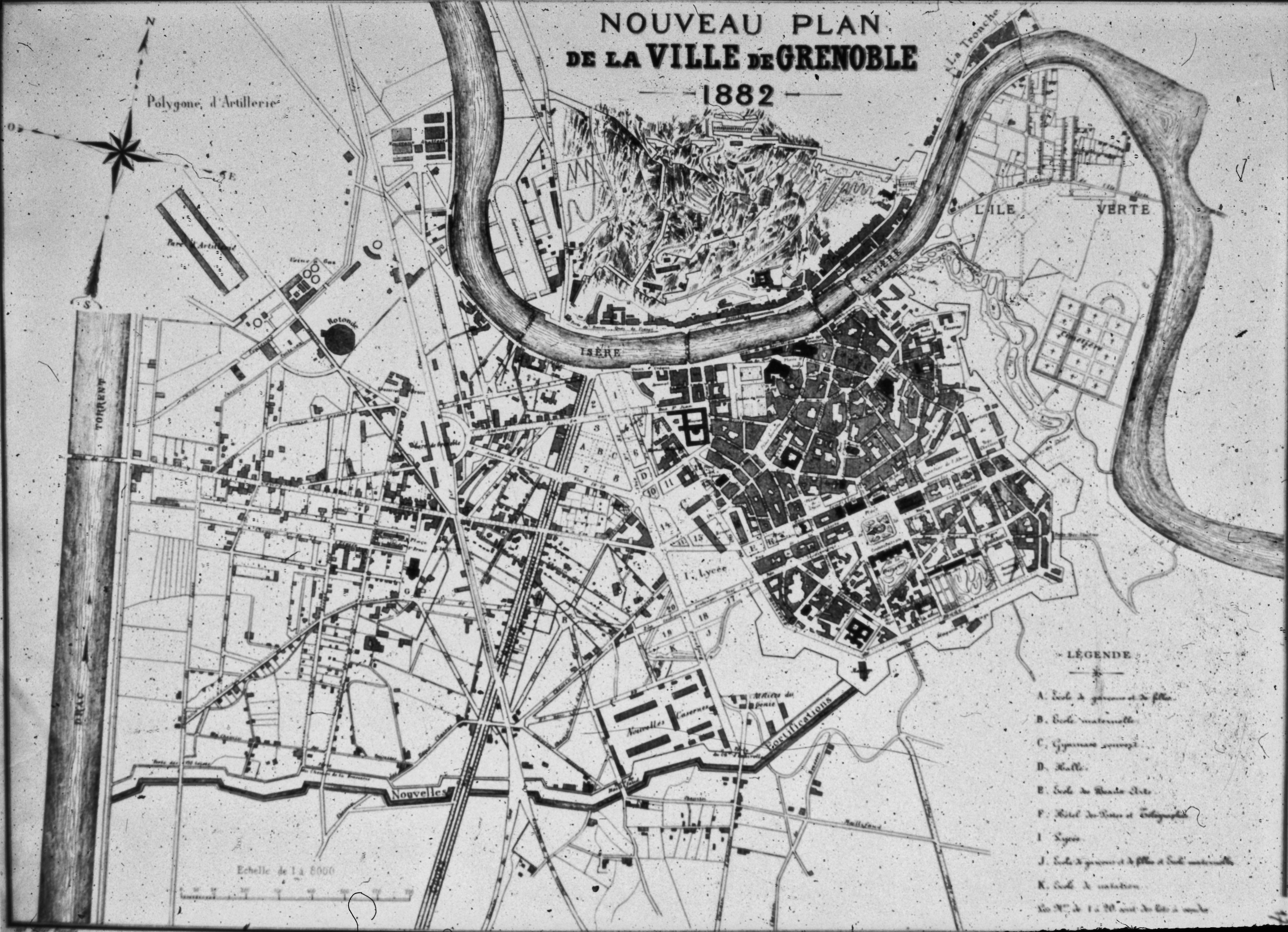 Grenoble en 1882 : présence des fortifications. Le quartier Berriat existe. Pas d'urbanisation en dehors des fortifs